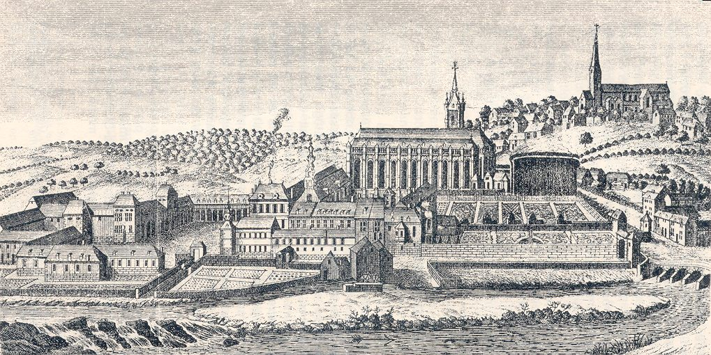 Gravure ancienne de l'abbaye de Lobbes (Belgique)